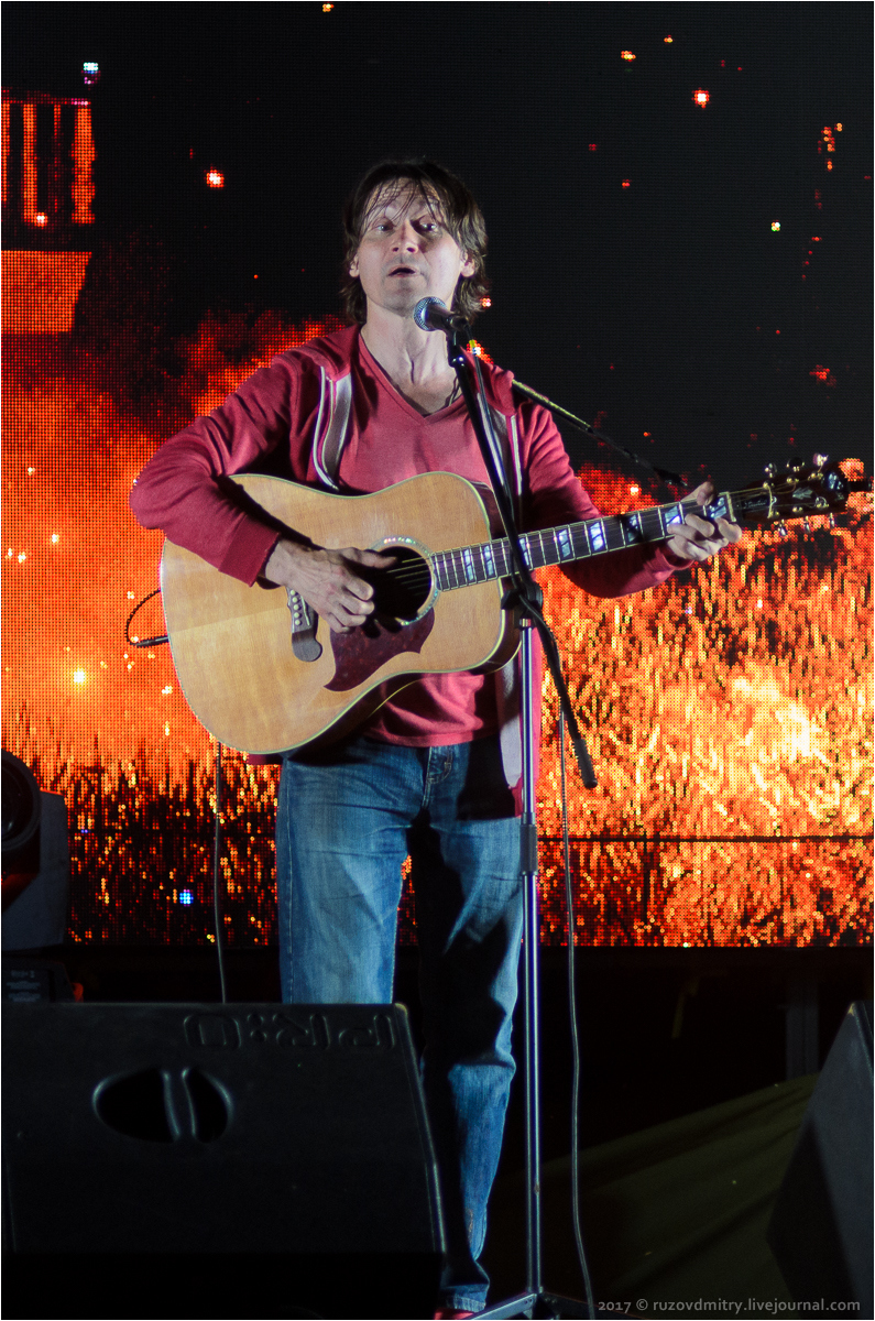 Григорий Данской. 44-й фестиваль авторской песни им. Валерия Грушина. Мастрюковские озера, Самарская область, Россия